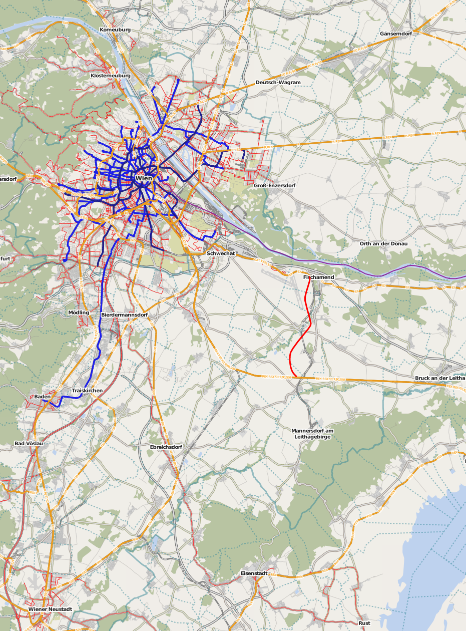 Übersichtskarte der geplanten Götzendorfer Spange This map may be incomplete, and may contain errors. Don't rely solely on it for navigation.